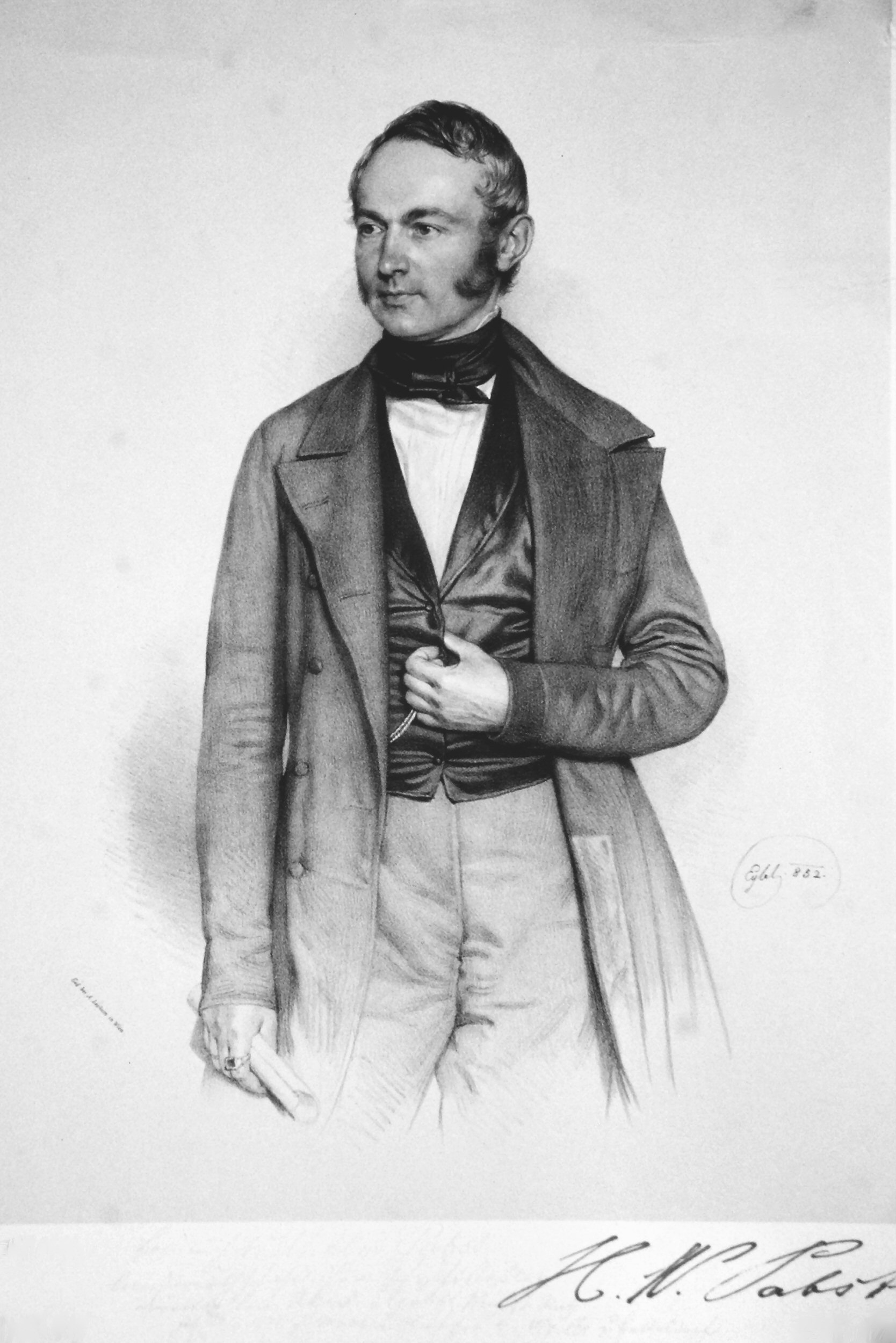 Heinrich Wilhelm Pabst (1796-1868), deutscher Agrarwissenschaftler. Lithographie von Franz Eybl, 1852